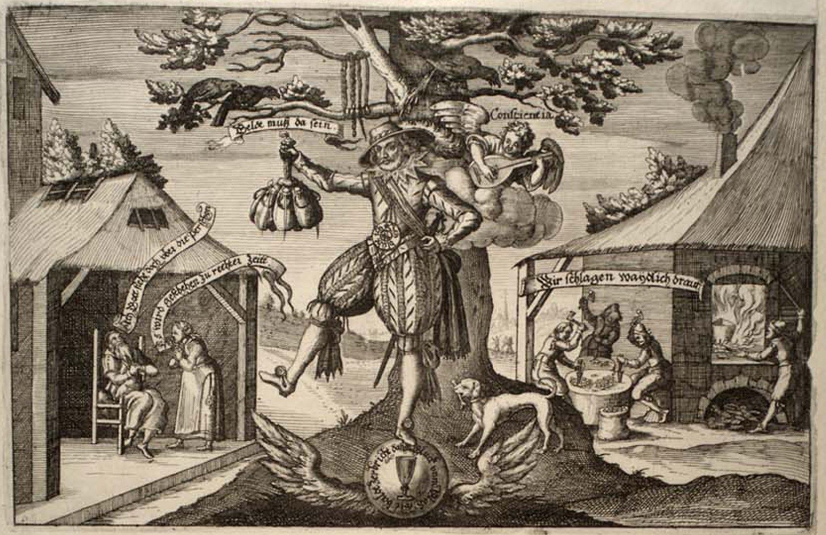 Der Wucherische Müntzmeister